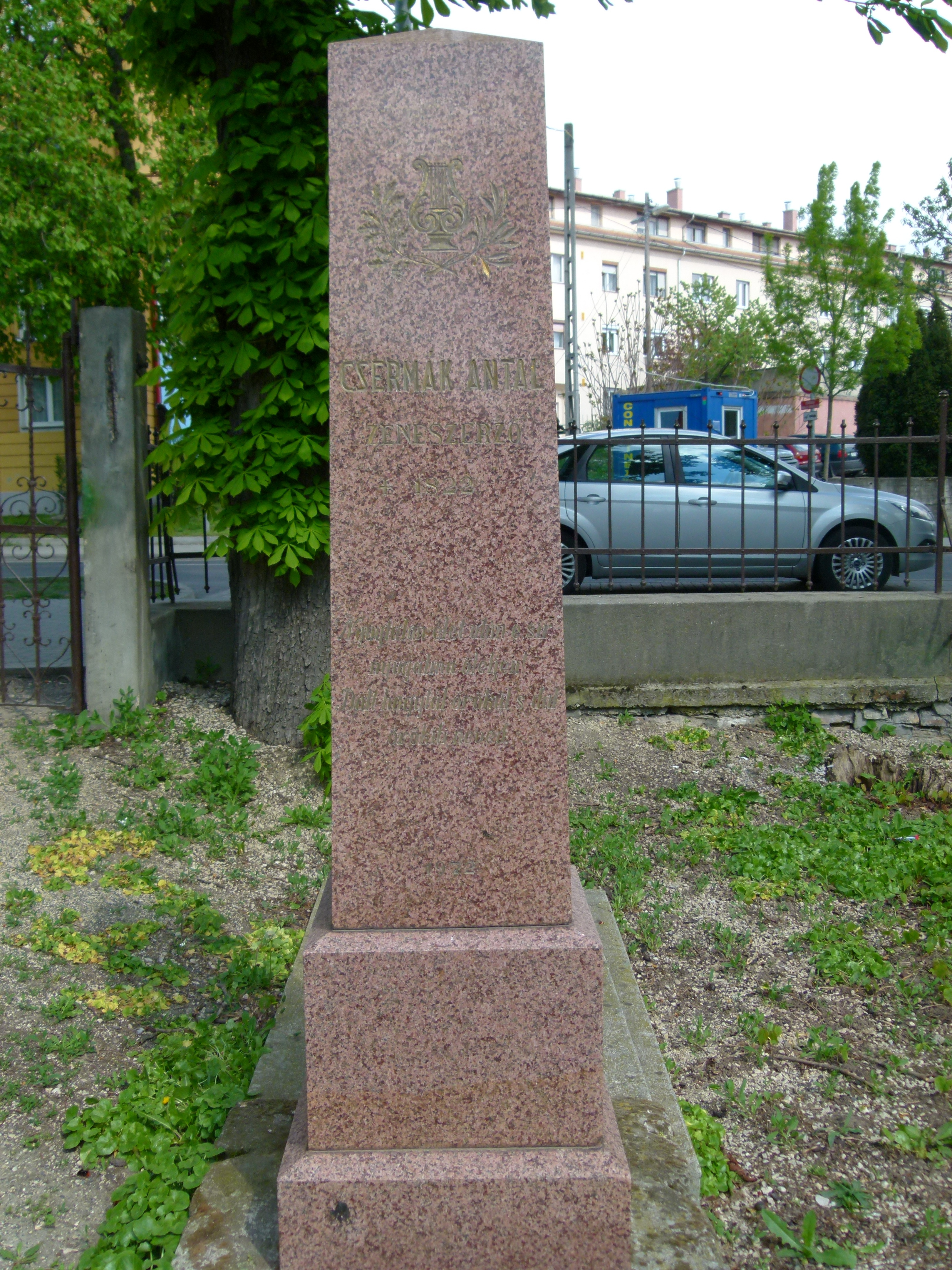 Csermák Antal György (1774-1822), zeneszerző sírja, Alsóvárosi temető, Veszprém